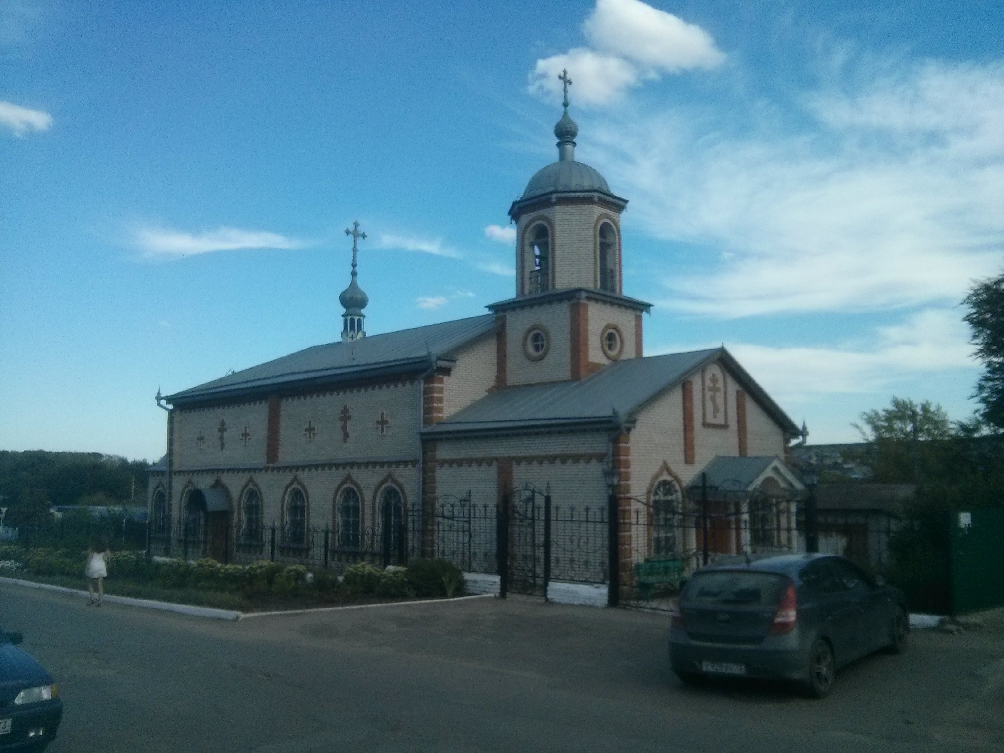 Церковь Святого Николая в Николаевке